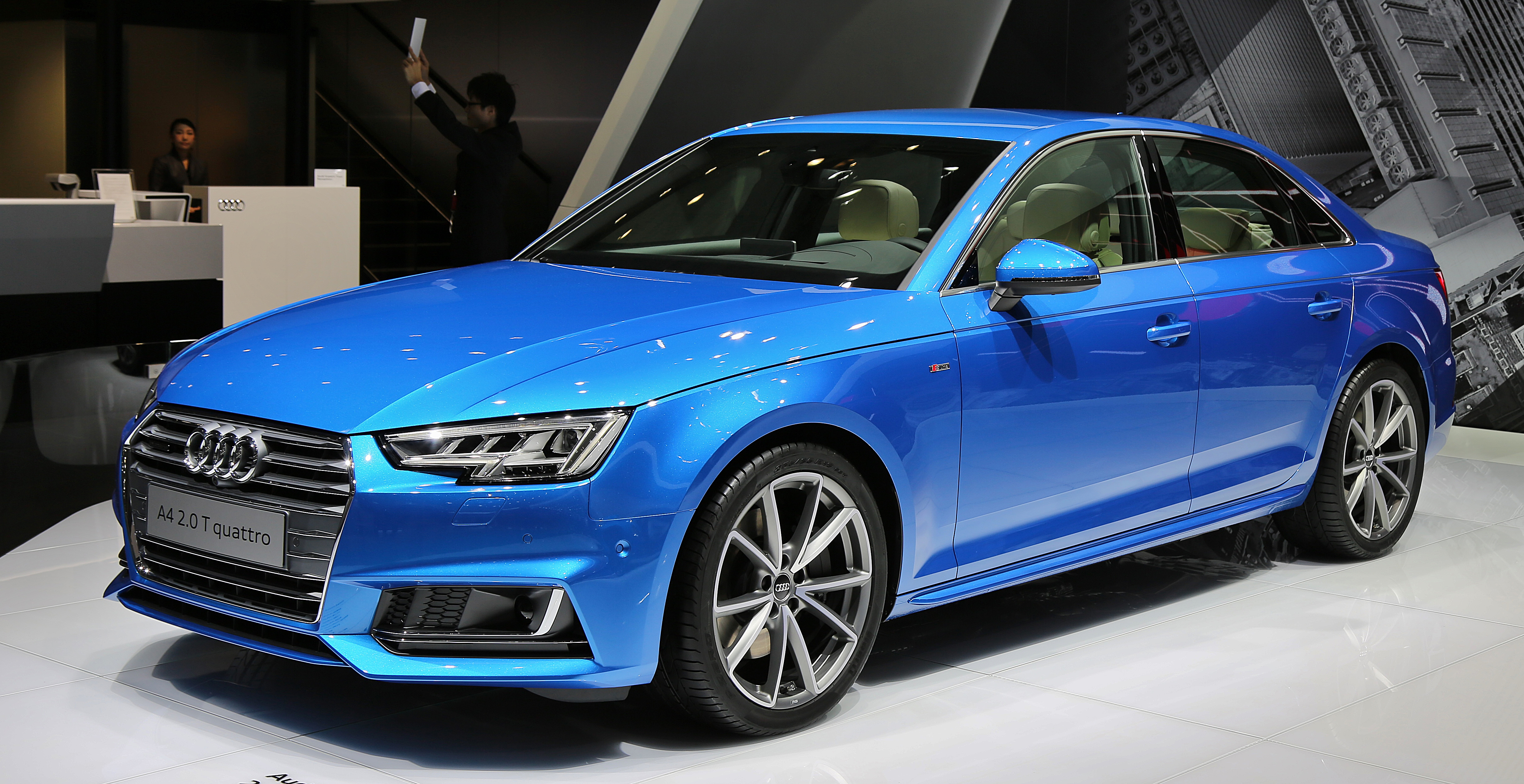 Audi A4 B9